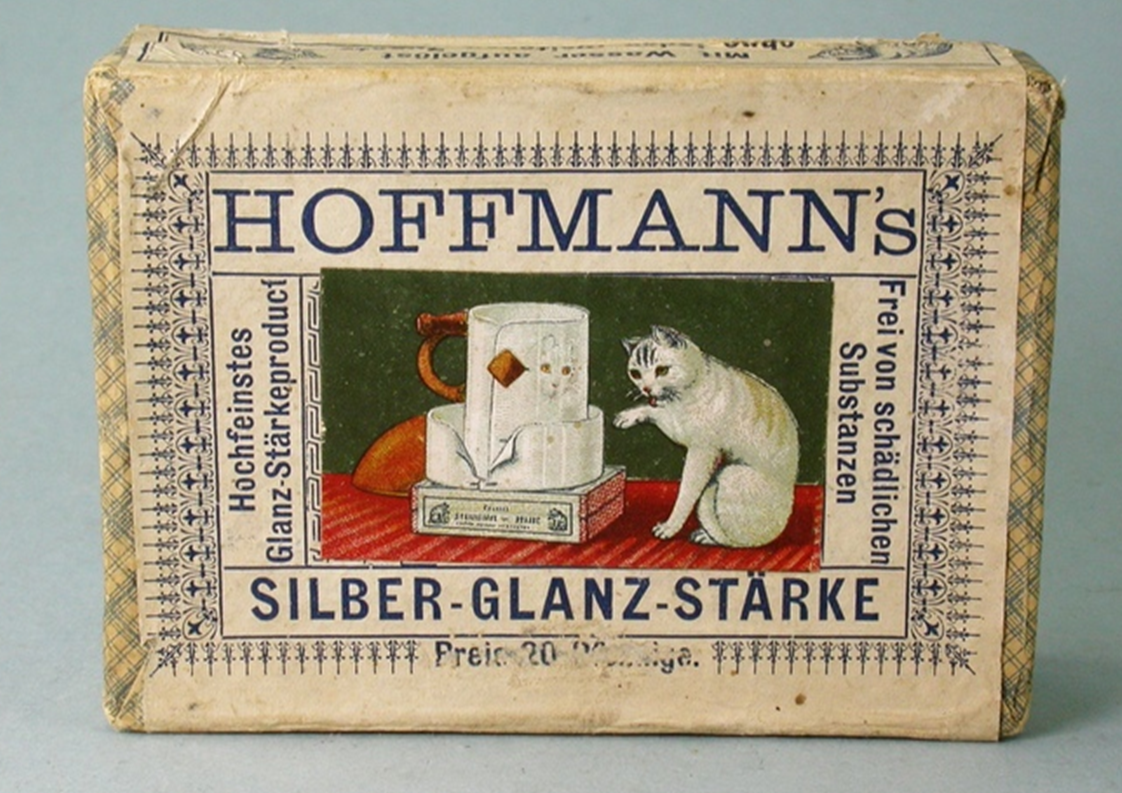 Silber-Glanz-Stärke (Packung)